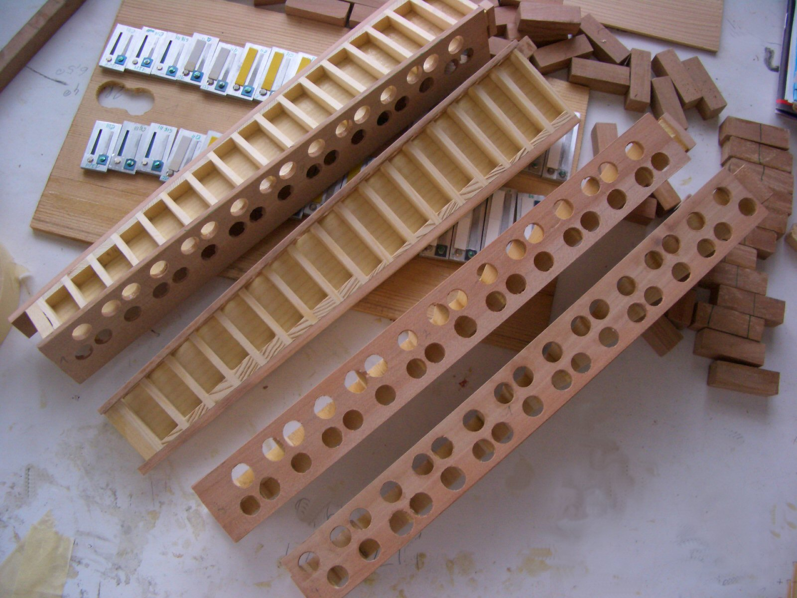 Stimmstöcke geklebt 3 Chörig andere Versionen: ... Möglichkeiten zur Lizenzierung, bitte die nicht-benötigte Variante aus dem Code löschen